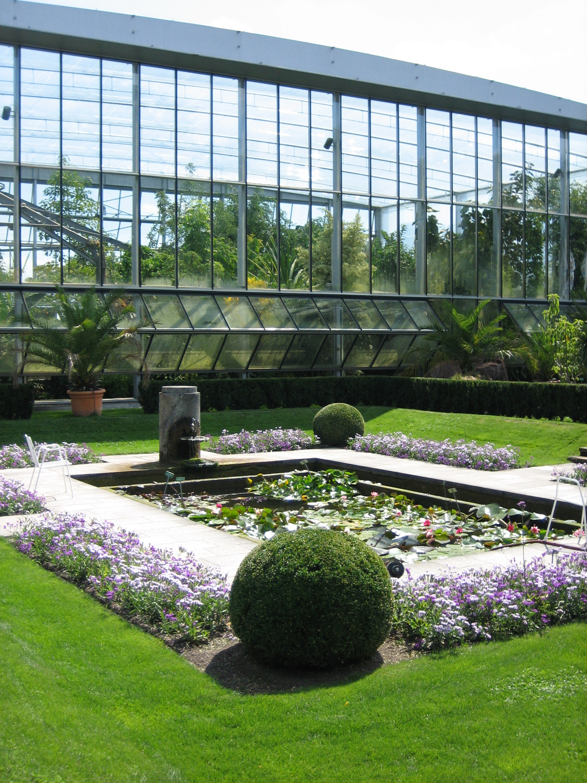 Botanischer Garten in Augsburg, Blick über den alten Wassergarten